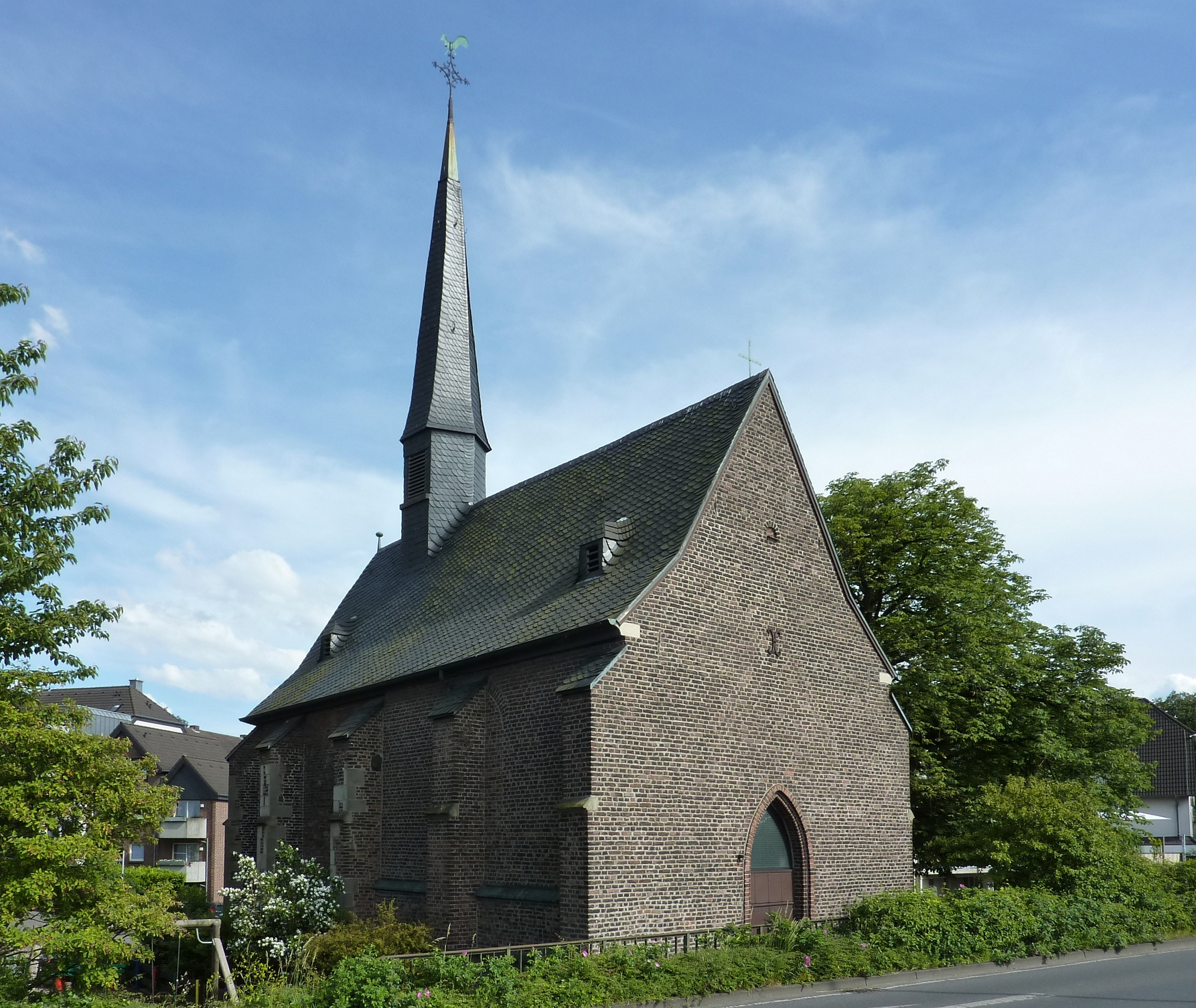 Monheim, Marienkapelle von Nordwesten